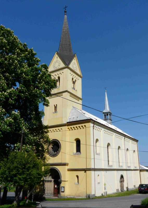 Čelo kostela